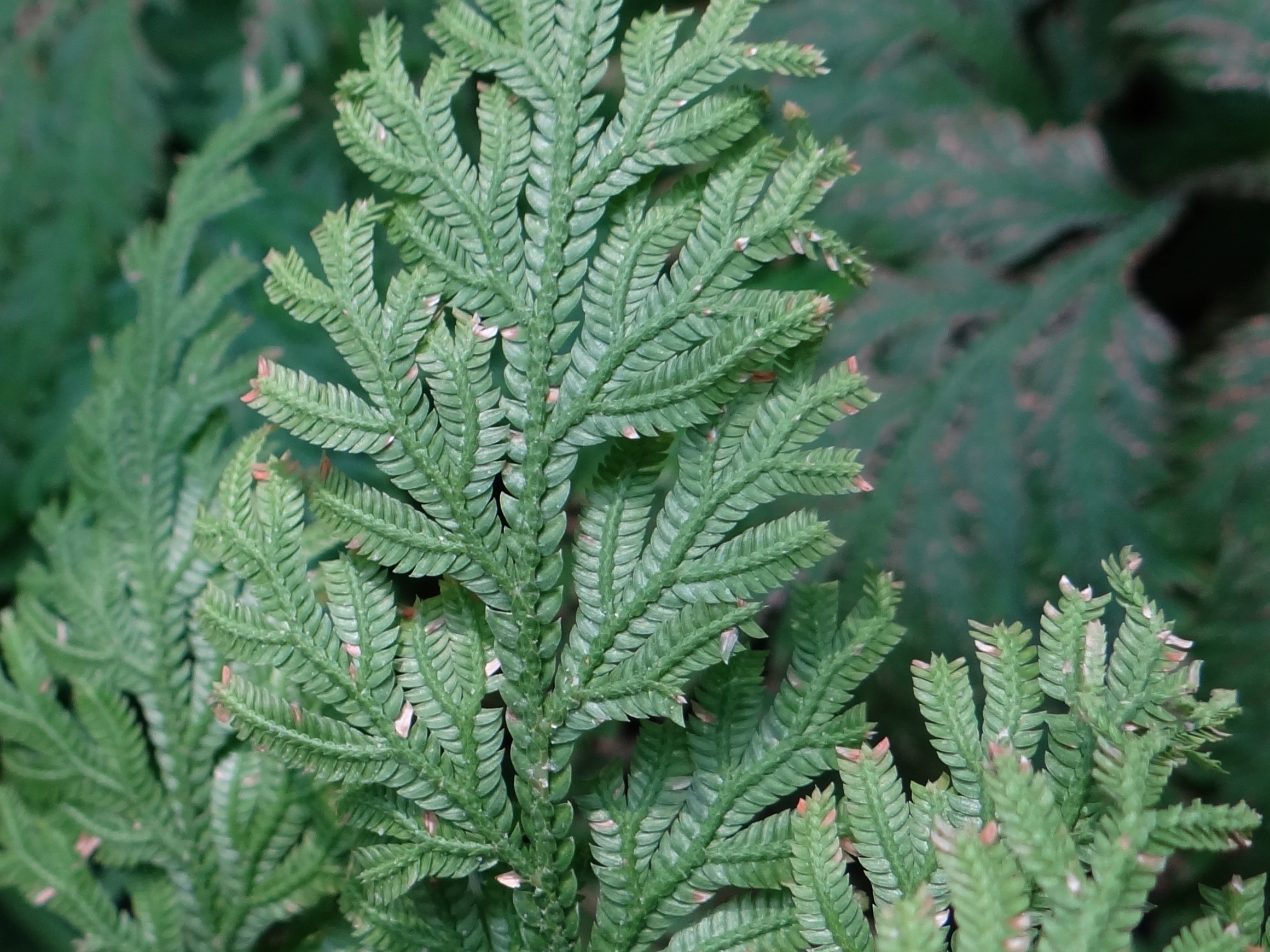 Selaginella haematodes (location:Botanical Garden in Cracow)